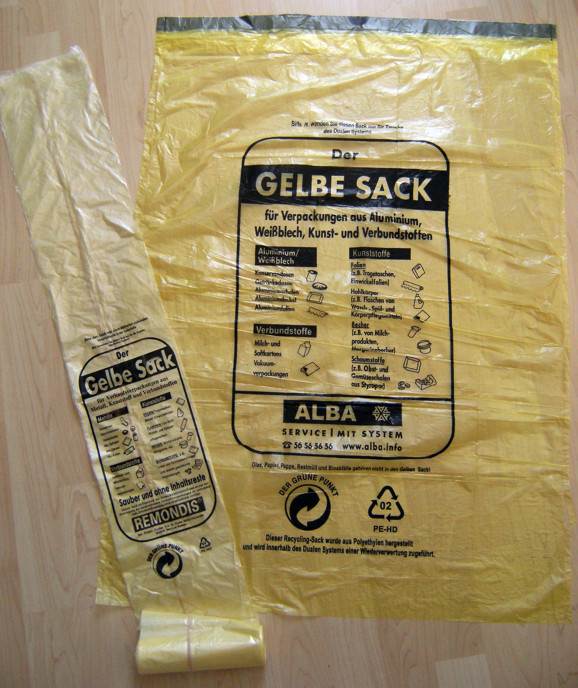 Gelber Sack DSD Firma ALBA und Remondis Abfallentsorgungsverband Schwarze Elster